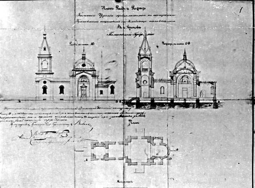 План Свято-Успенской церкви Крюкова (Кременчуг)